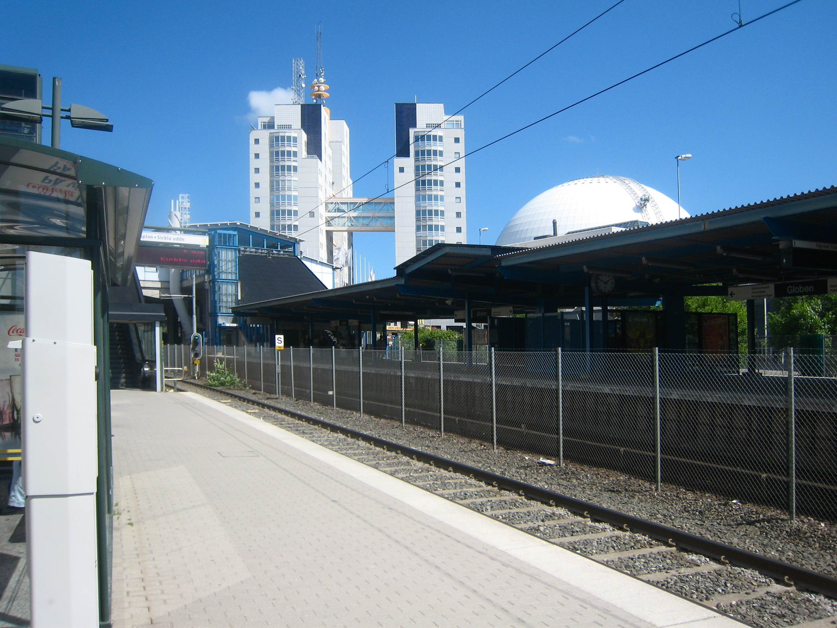 Globens tunnelbanestation sett från Tvärbanans station.